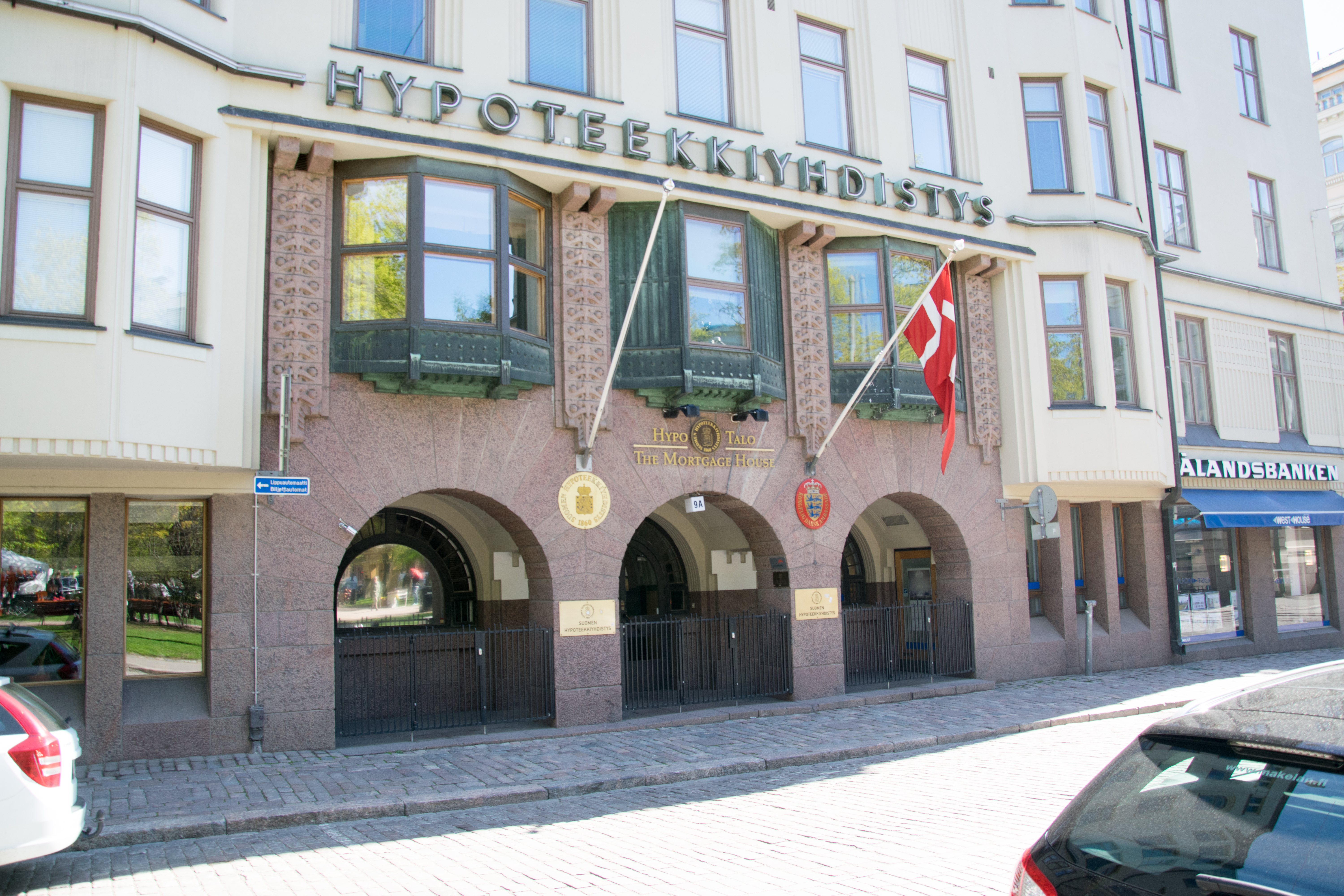 Hypoteekkiyhdistyksen toimitalo, Yrjönkatu 9, Helsinki